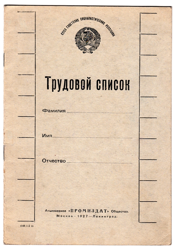 Трудовой список (Трудовая книжка) 1927 года. 6 листов. Тираж 500 тысяч.